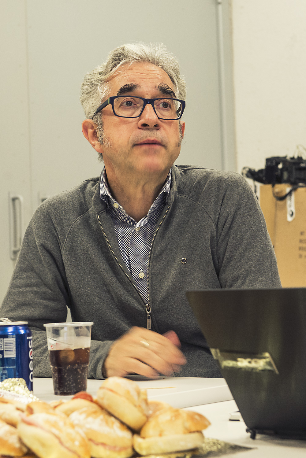 Fabra i Coats 25/05/2015 Foto: Marc Lozano